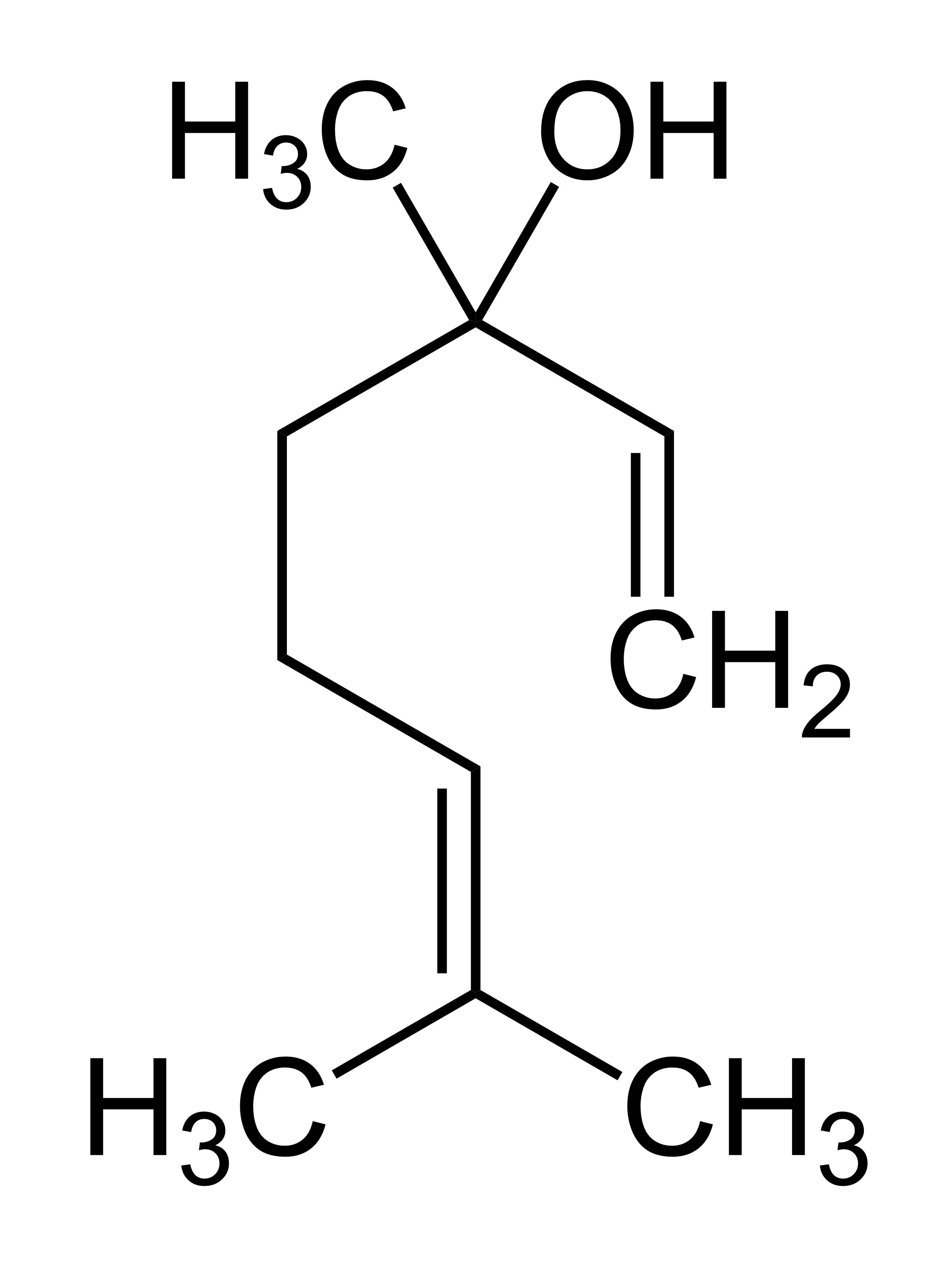 Strukturformel von Linalool (Bestandteil ätherischer Öle) ohne Stereochemie